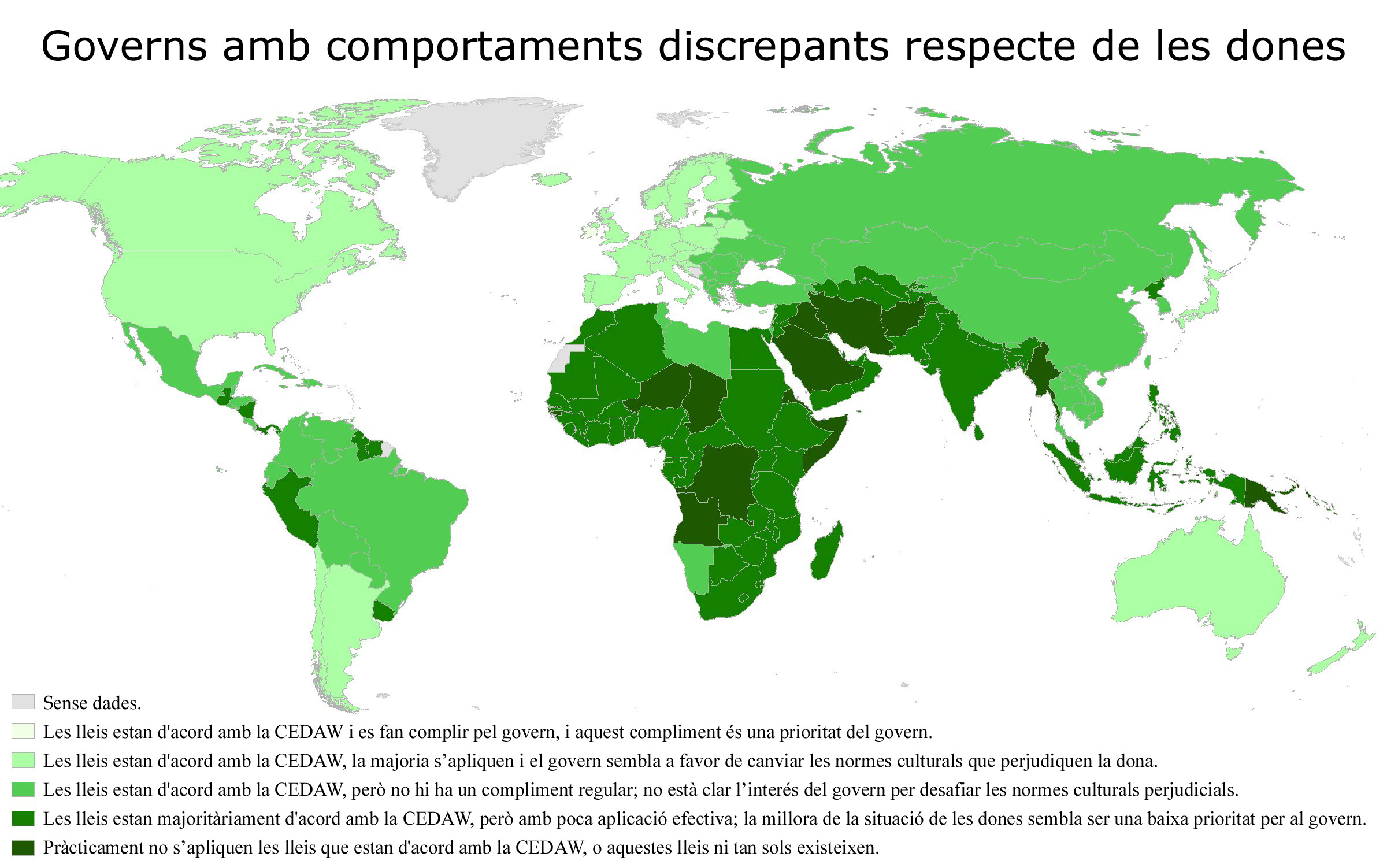 Traducció al català de Discrepàncies dels governs respecte de l'aplicació de la CEDAW (Convenció sobre l'eliminació de totes les formes de discriminació contra la dona)